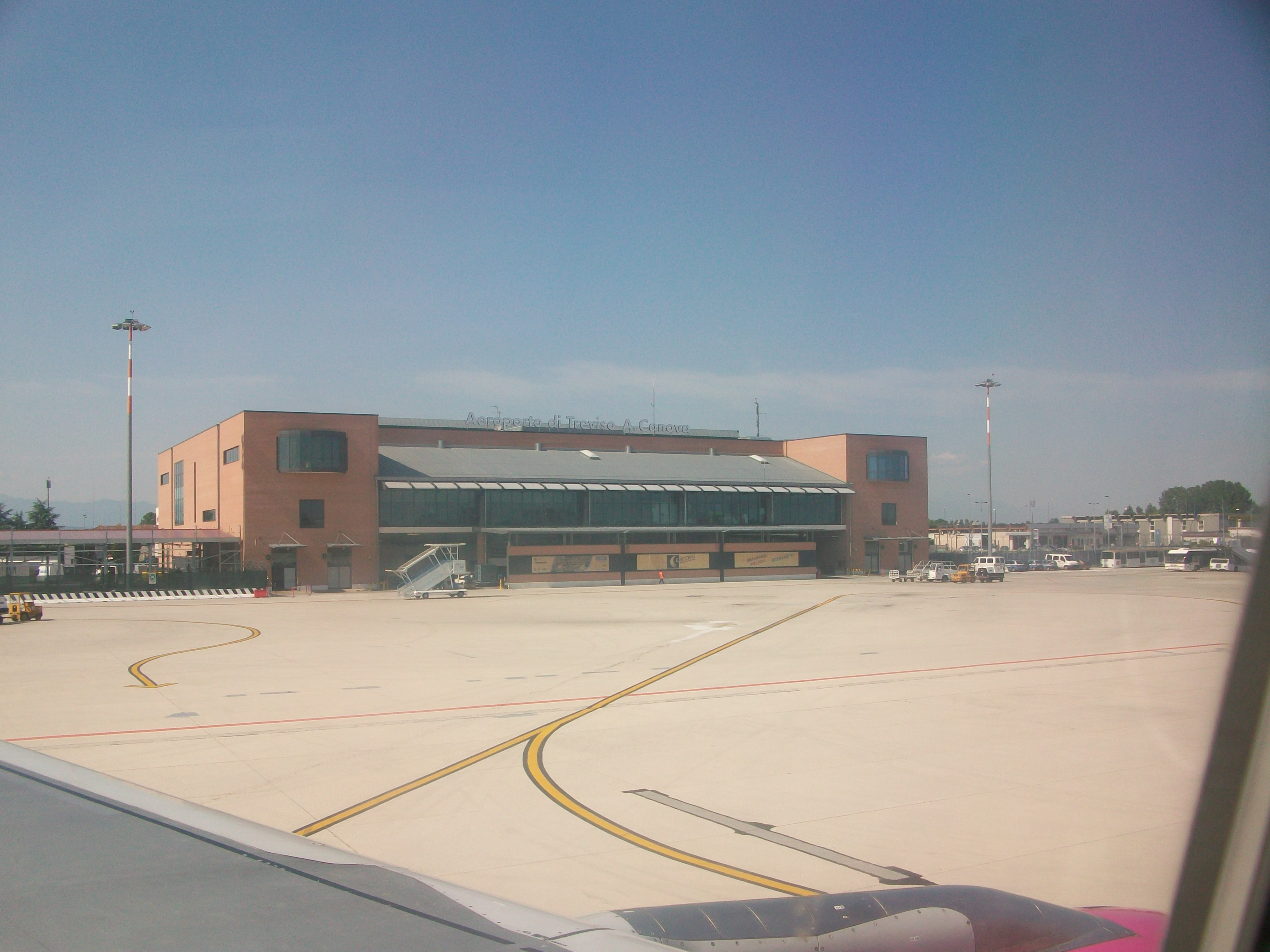 Volo Timisoara Treviso con Wizzair